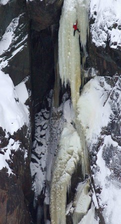 Andreas på is (born 1981)